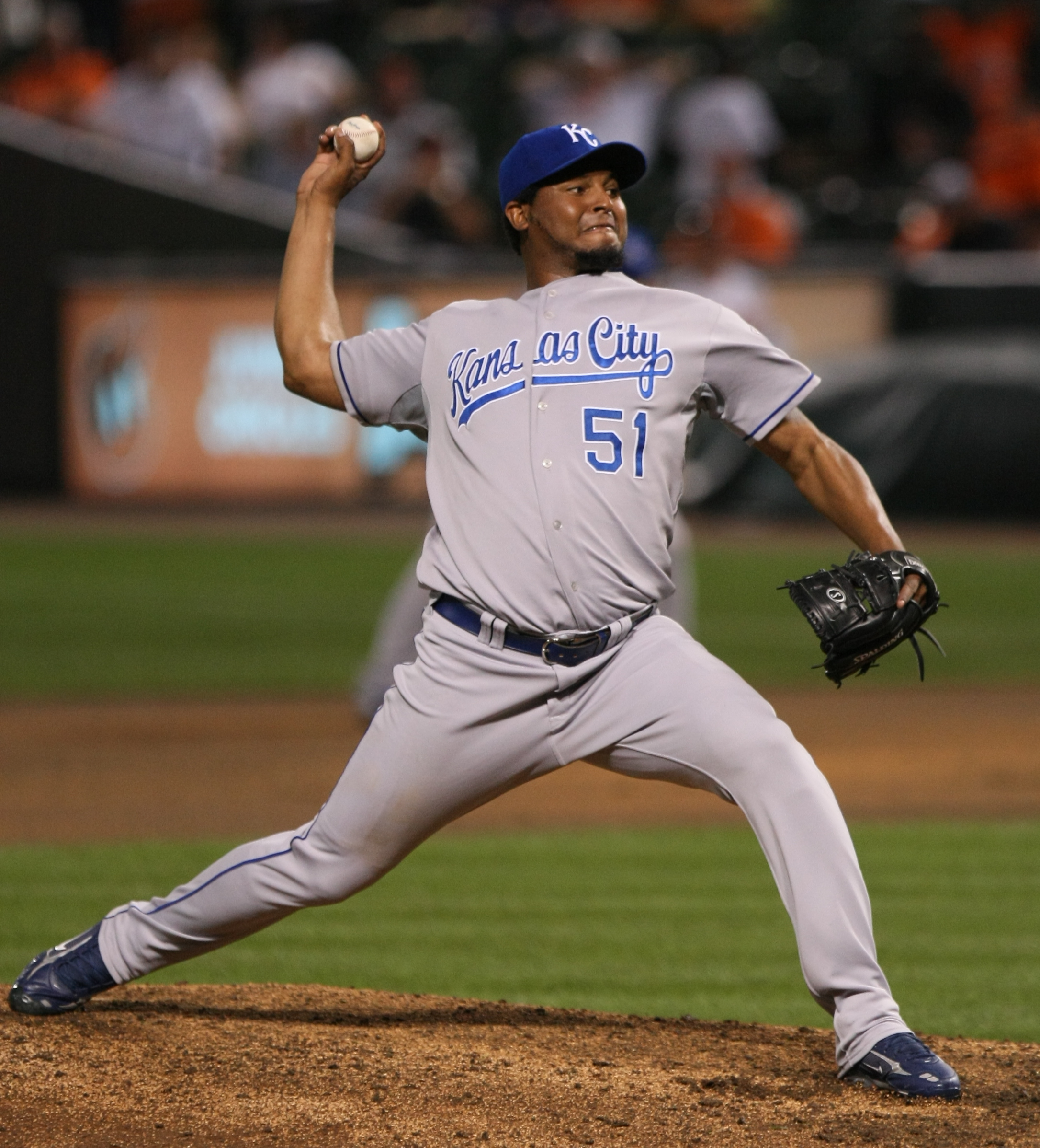 Robinson Tejeda